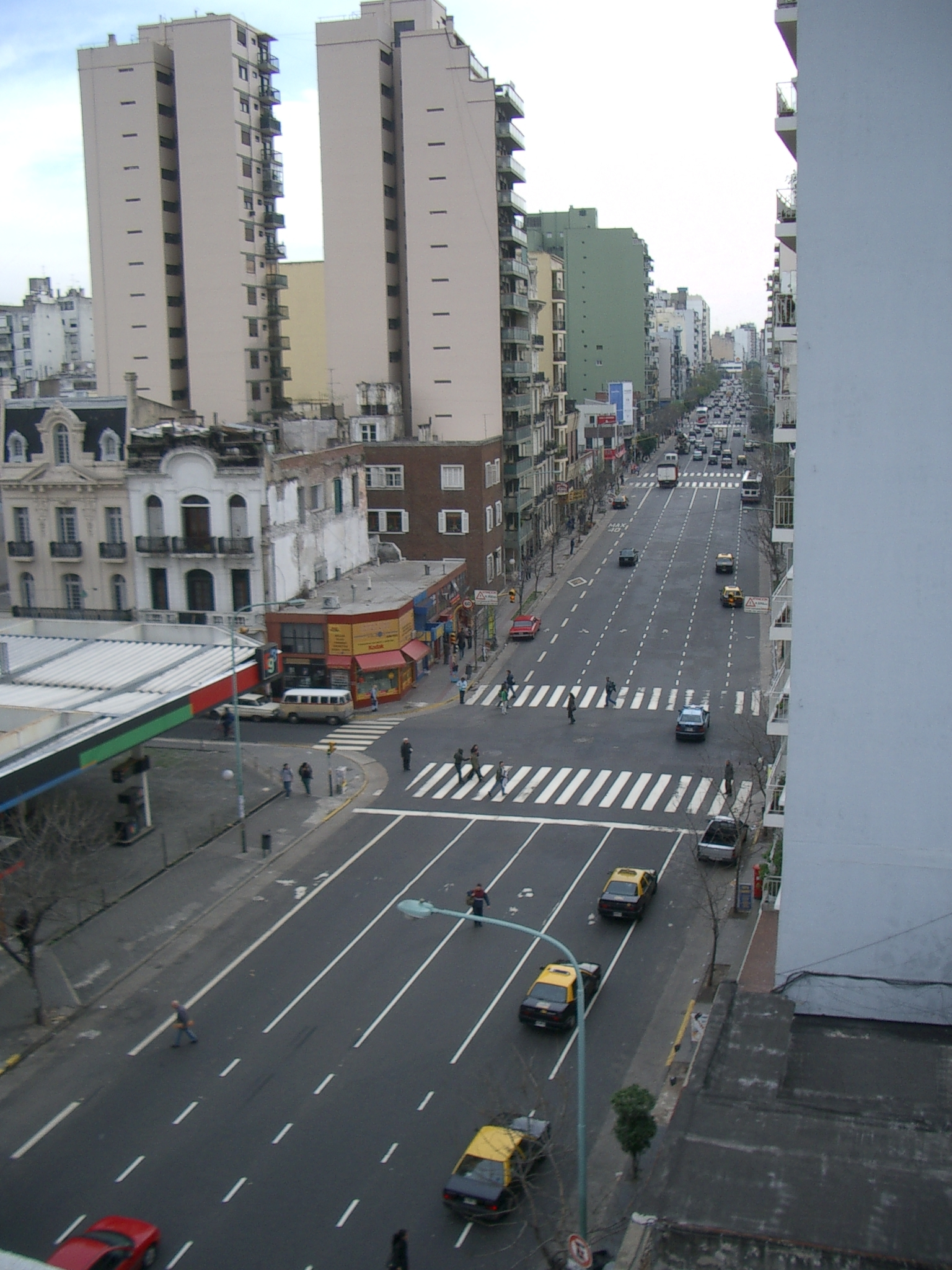 Avenida Independencia y Bolívar, San Telmo, Buenos Aires, Argentina.